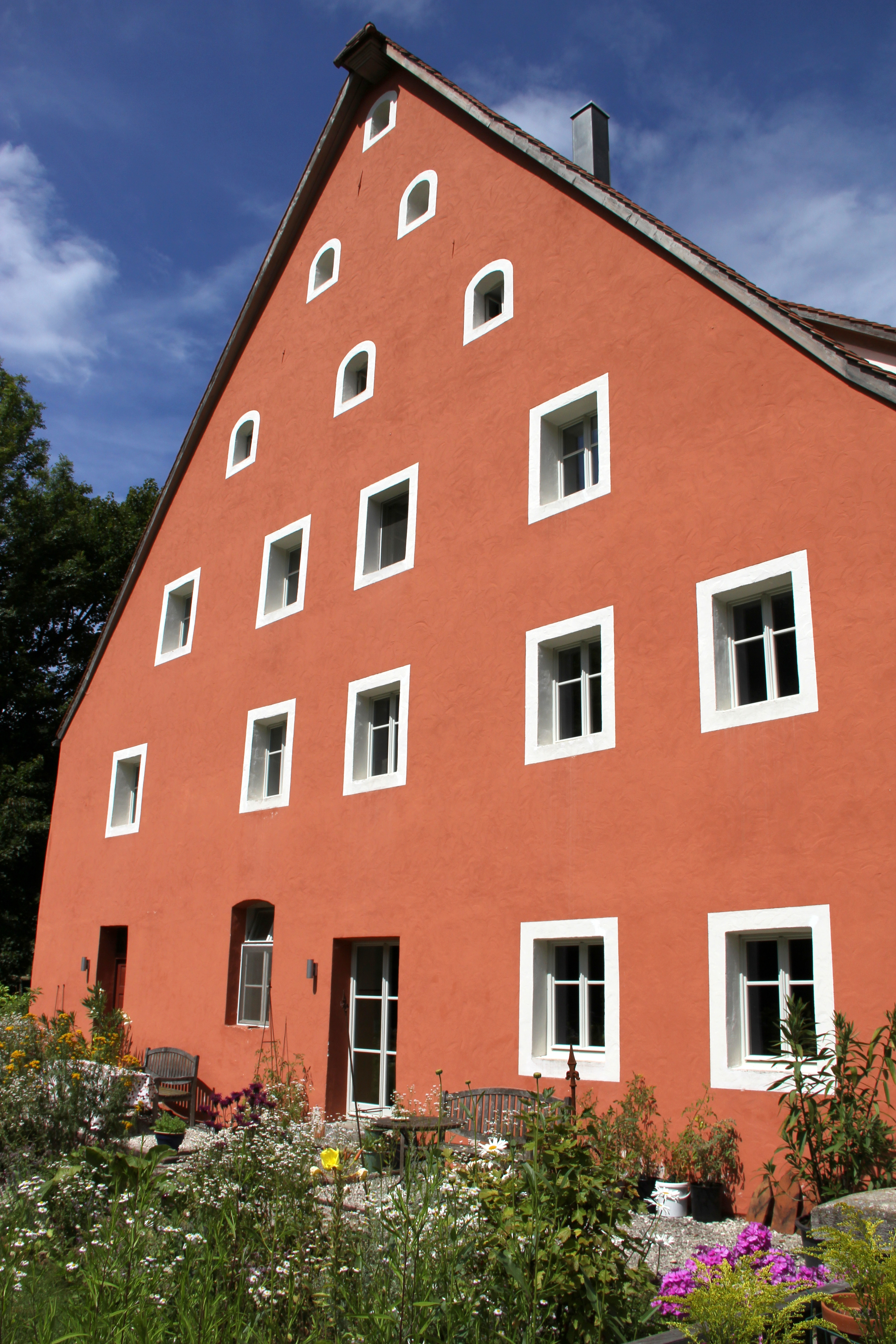 Oedmühle, Infotafel